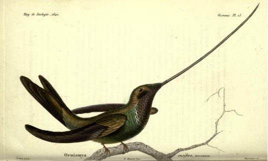 Mag. de Zoologie 1840, Oiseaux Pl 15, Ornismya ensifera Boissonneau, Pêtre, pinx., N. Rémond imp., Davesne sc. (Ornismya ensifera = Ensifera ensifera)